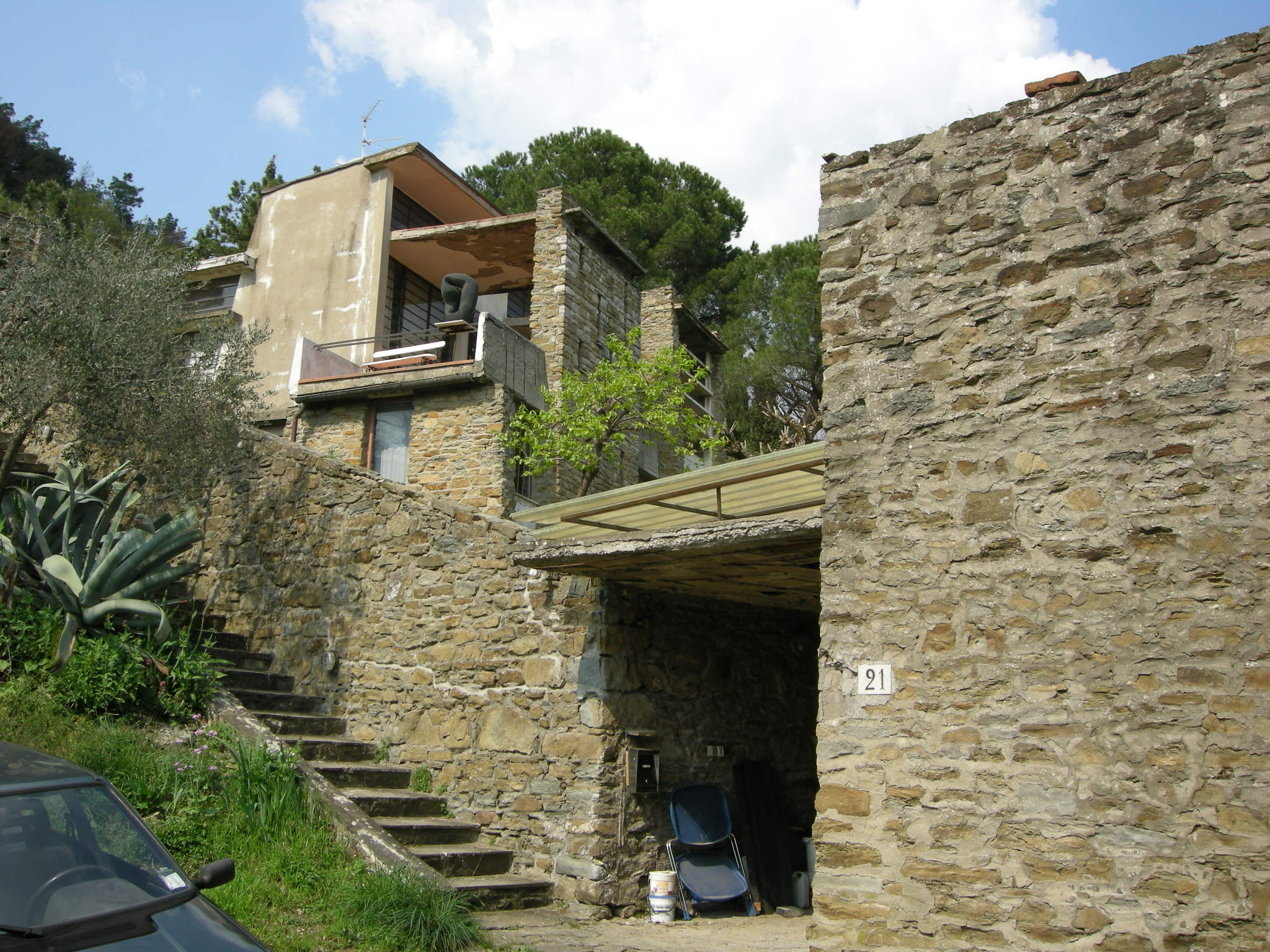 Casa-studio di Leonardo Ricci